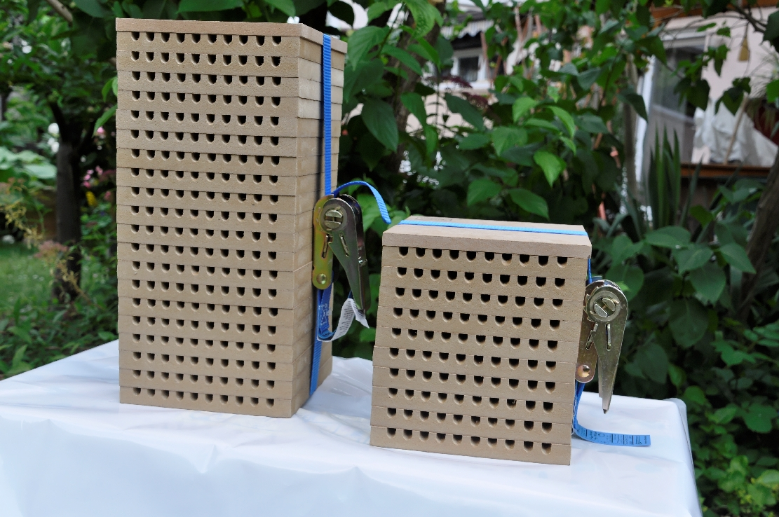 Mauerbienen -modulare Nisthilfe Nistbretter